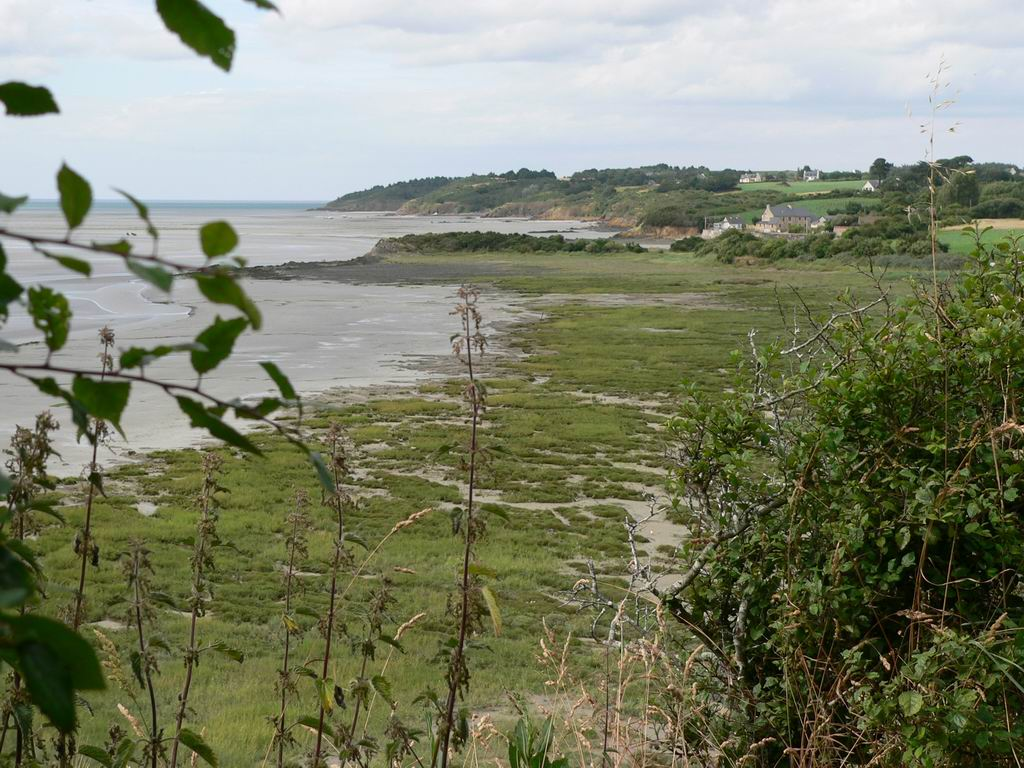 Hillion, Pointe du Grouin